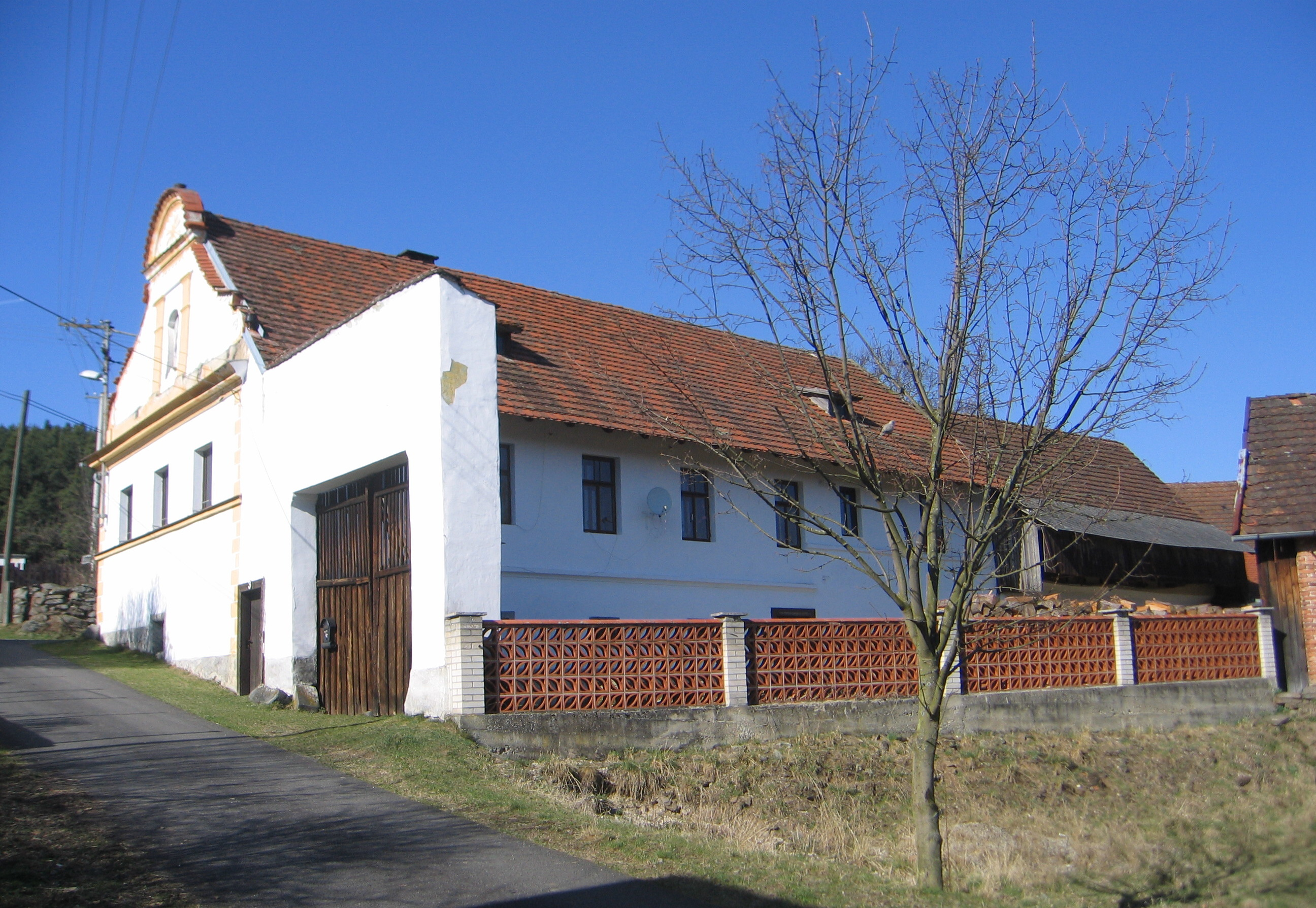 Venkovská usedlost (Makarov), Makarov 3